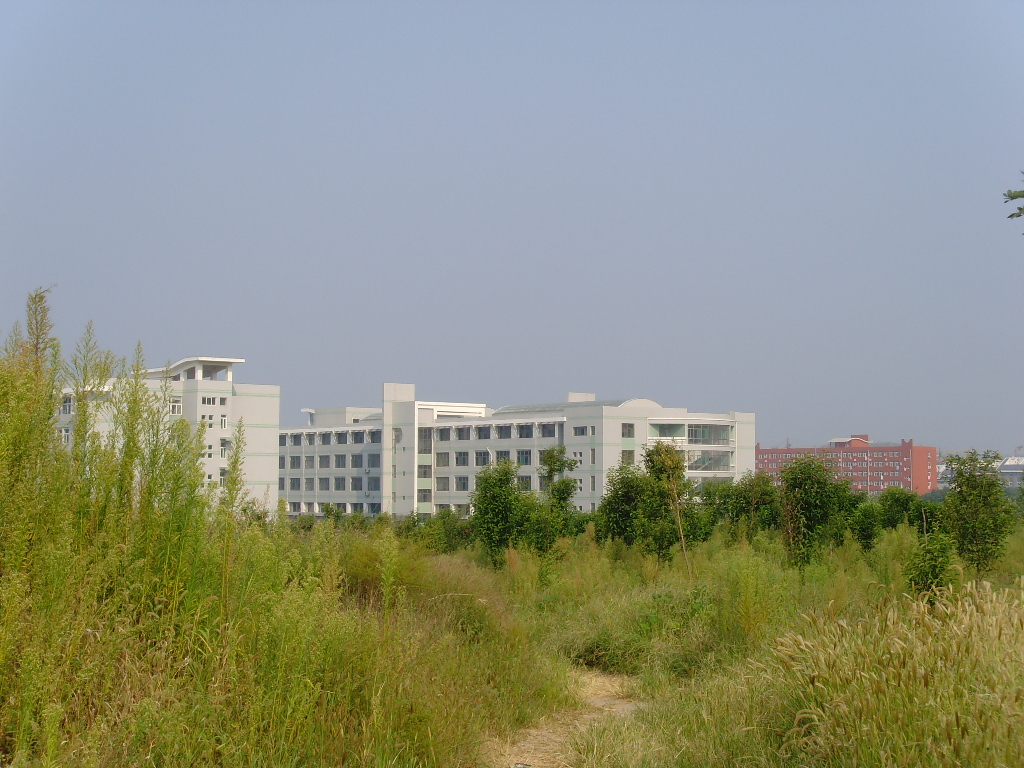 中华女子学院山东分院长清校区山景